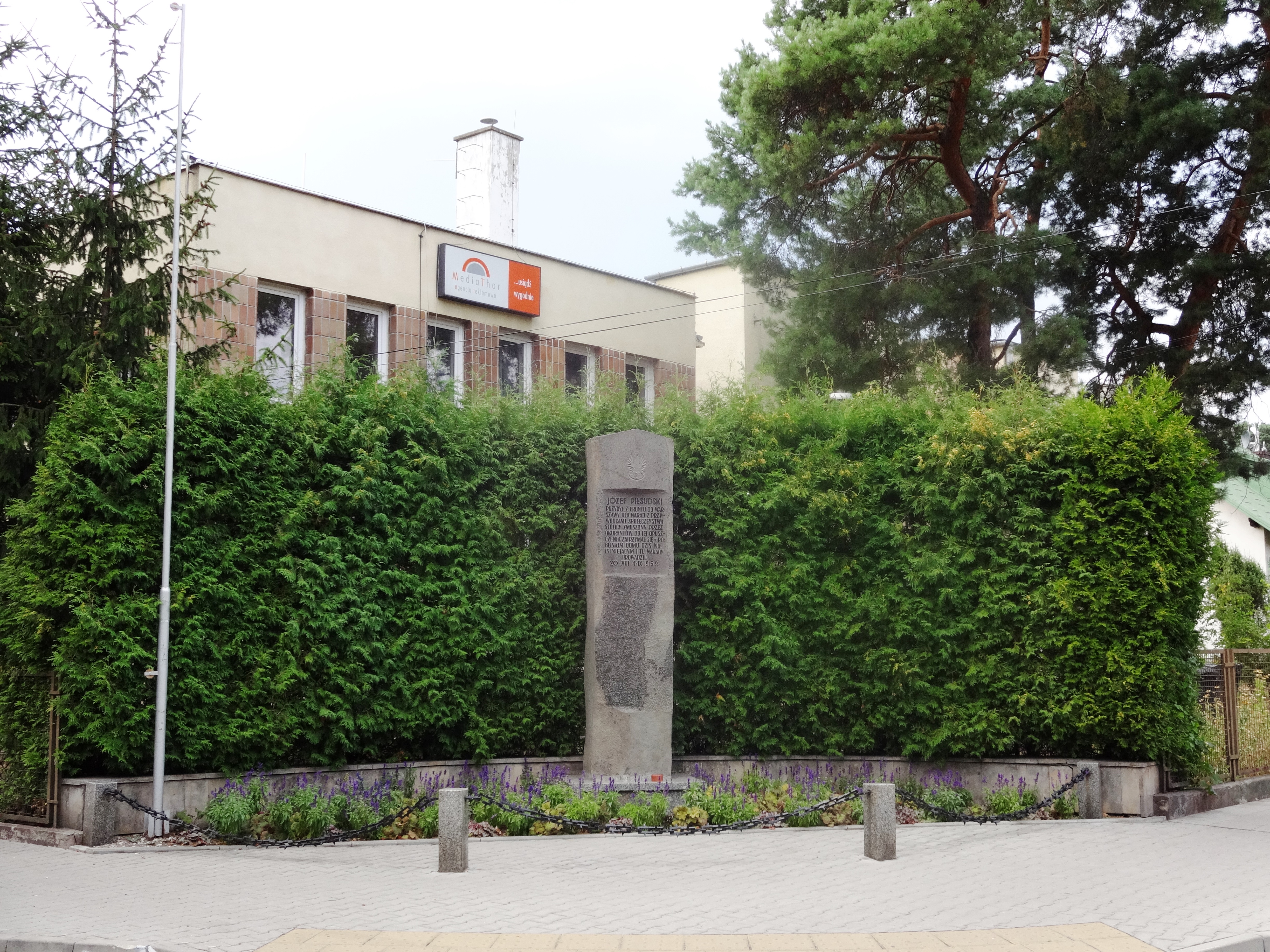 Przy skrzyżowaniu ulic Kościuszki i Chopina obelisk na pamiątkę pobytu Józefa Piłsudskiego w Otwocku. Ufundowany przed II wojną, wykonany w kopalni bazaltu w Dolinie Janowskiej na Wołyniu., Po wojnie obelisk leżał na poboczu skrzyżowania ulic Kościuszki i Żeromskiego. Na przełomie lat 50. i 60. "zaginął". Dzięki anonimowej informacji, odnalazł go Eugeniusz Dąbała - honorowy prezes Spółdzielni Rzemieślniczej w Otwocku. Pomnik leżał w Muzeum Ziemi w Warszawie (pracownicy zagipsowali go i ułożyli napisem do ziemi). Poświęcony i odsłonięty ponownie w 1992 r.